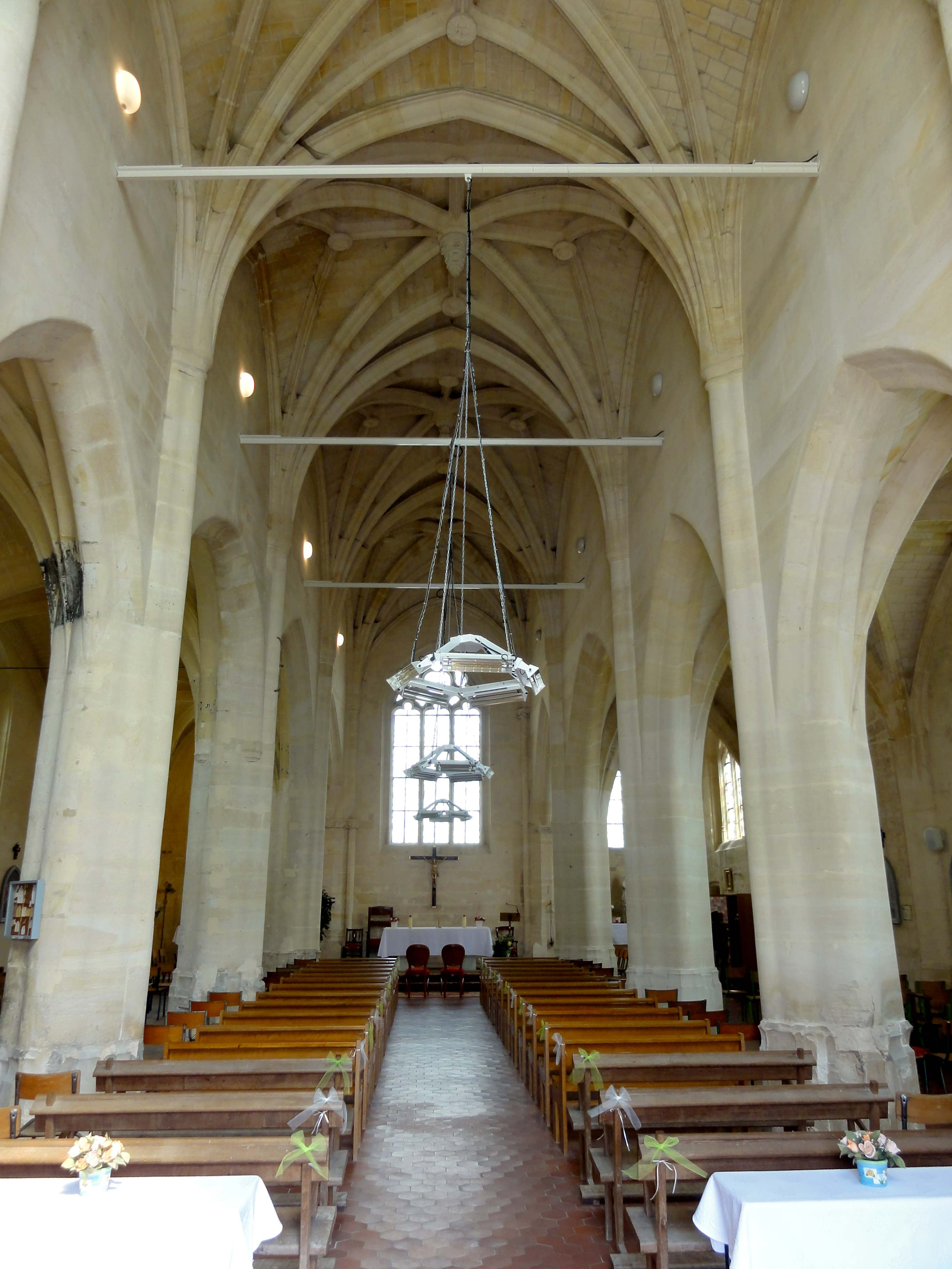 Intérieur de l'église - voir titre.